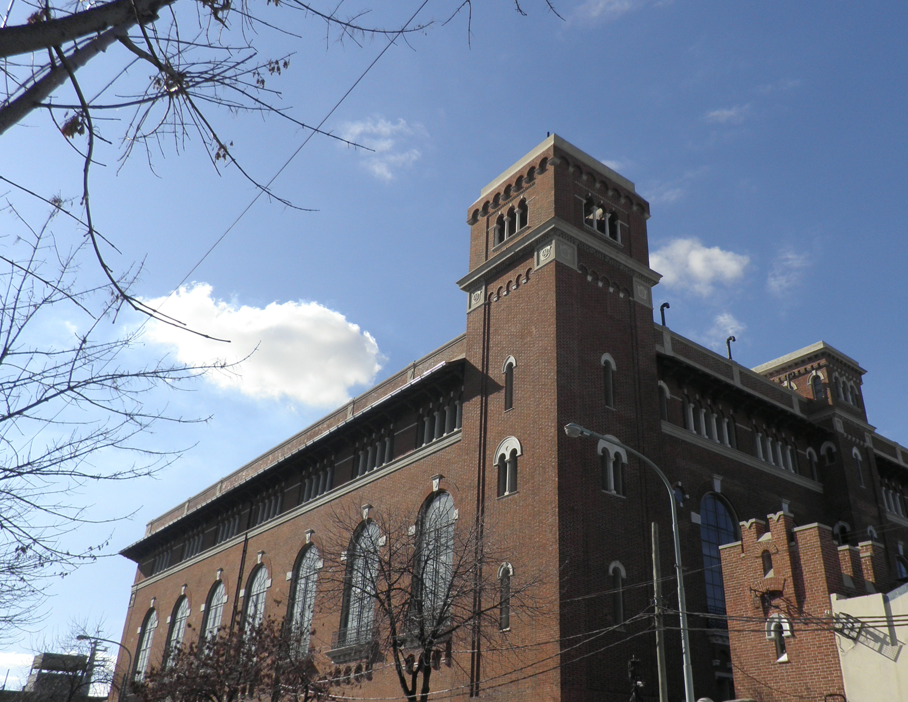 Usina Pedro de Mendoza de la Compañía ex Italo Argentina de Electricidad de Buenos Aires